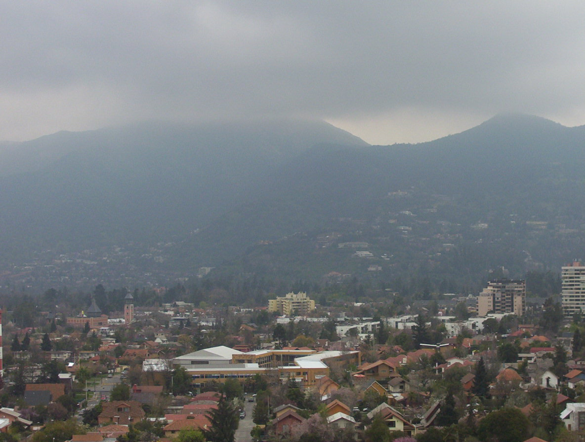 Cerro Manquehue desde LAs Condes